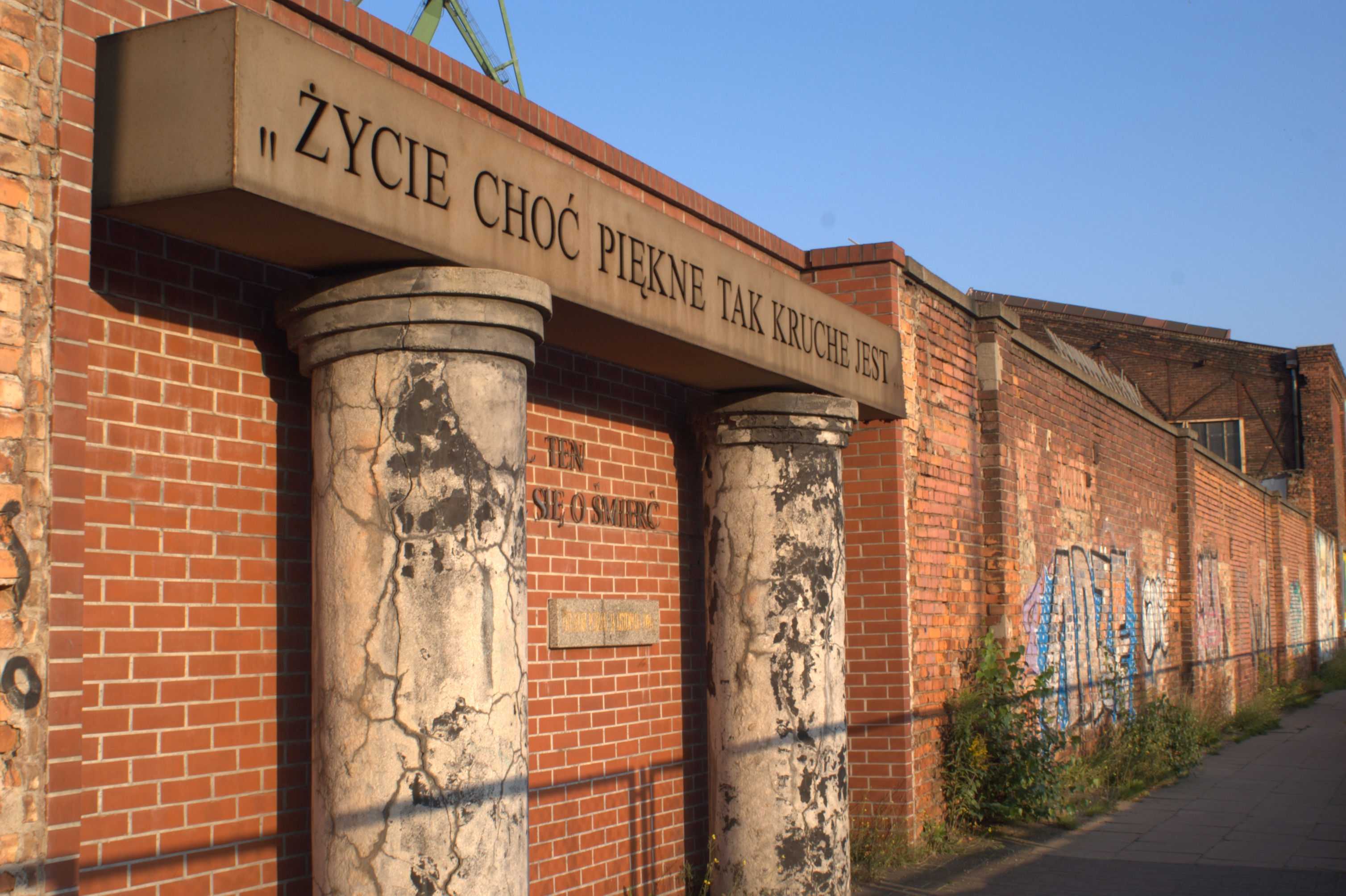 Pomnik "Ofiarom pożaru w hali widowiskowej Stoczni Gdańskiej w dniu 24 listopada 1994 r" przy ul. Jana z Kolna w Gdańsku. Napis "Życie tak piękne choć kruche jest" jest fragmentem piosenki "24.11.94" zespołu Golden Life, poświęconej ofiarom pożaru.